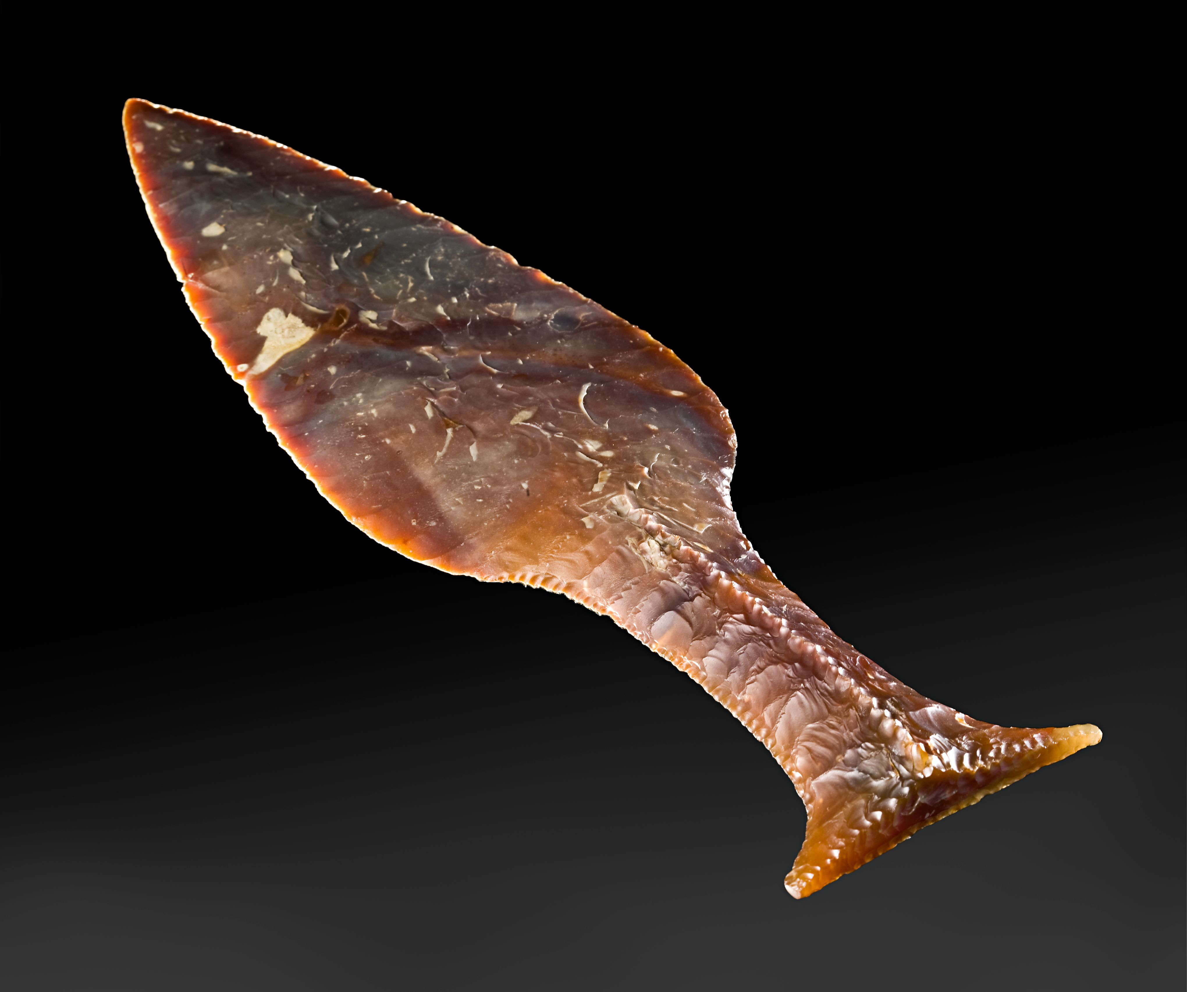 Hindsgavldolken fra forskellige vinkler.